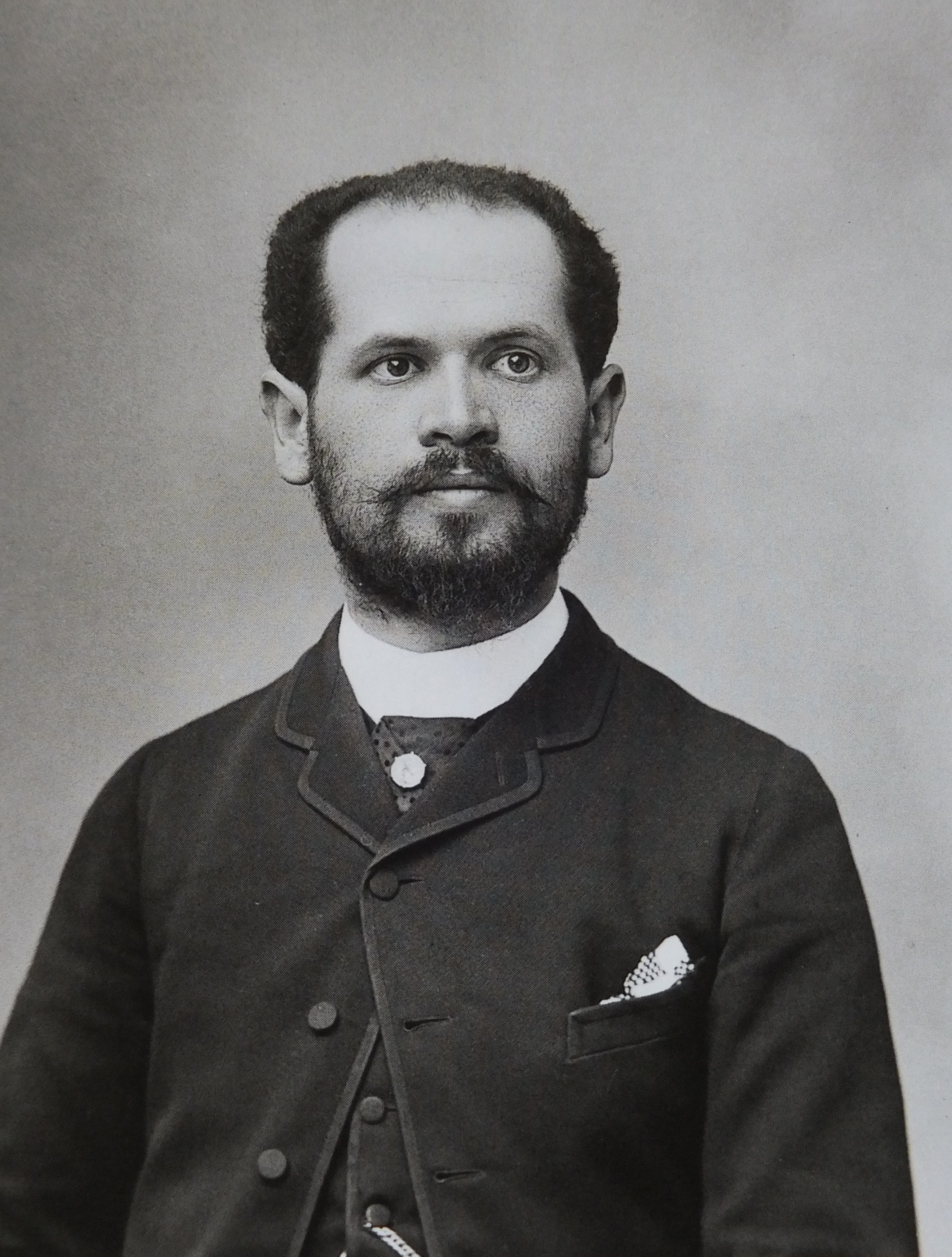 Paul Desjardins, photographié par Paul Nadar le 27 avril 1889.